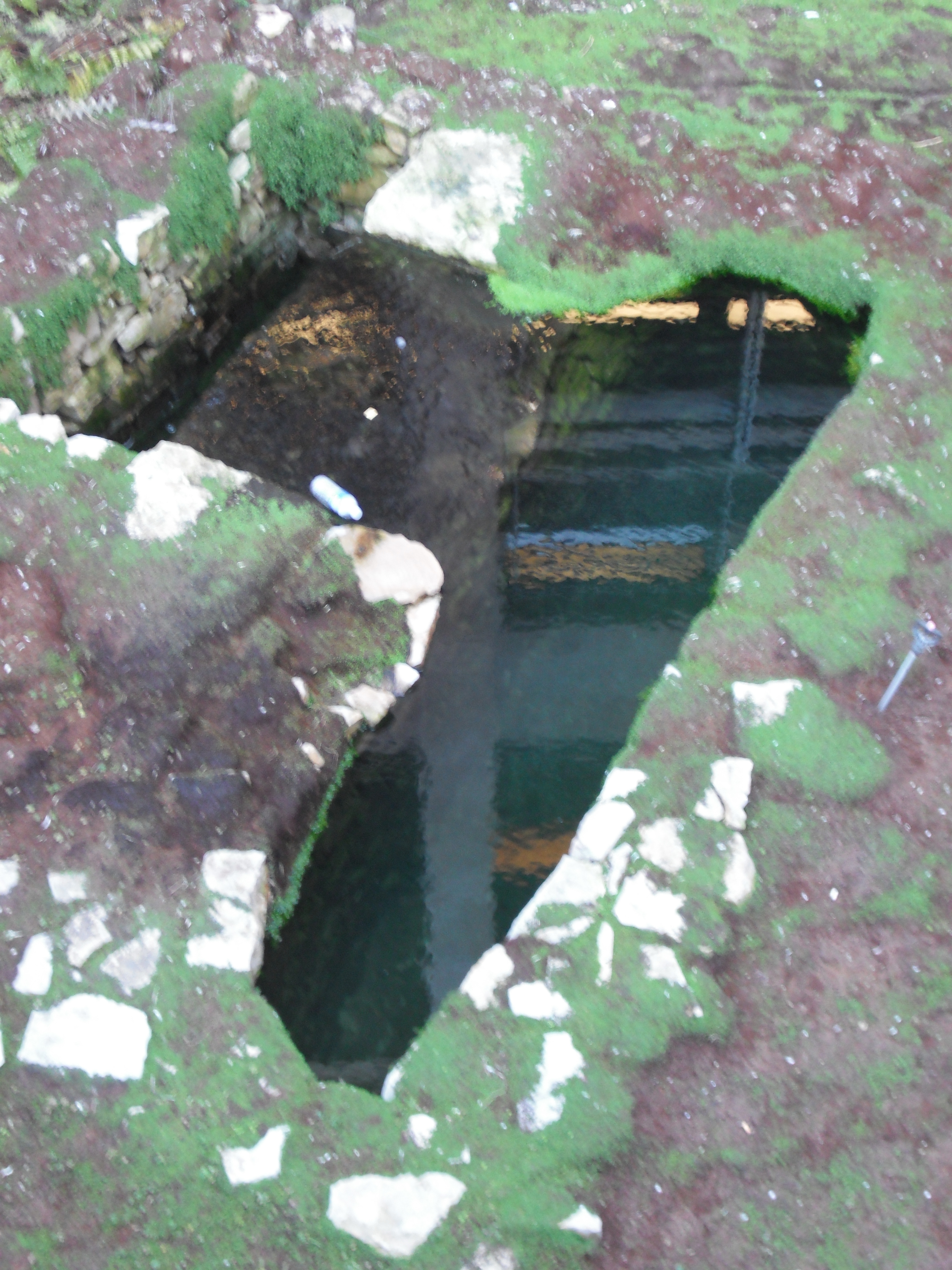 Noria située à l'intérieur de la cour du palais de justice d'Aix-en-Provence